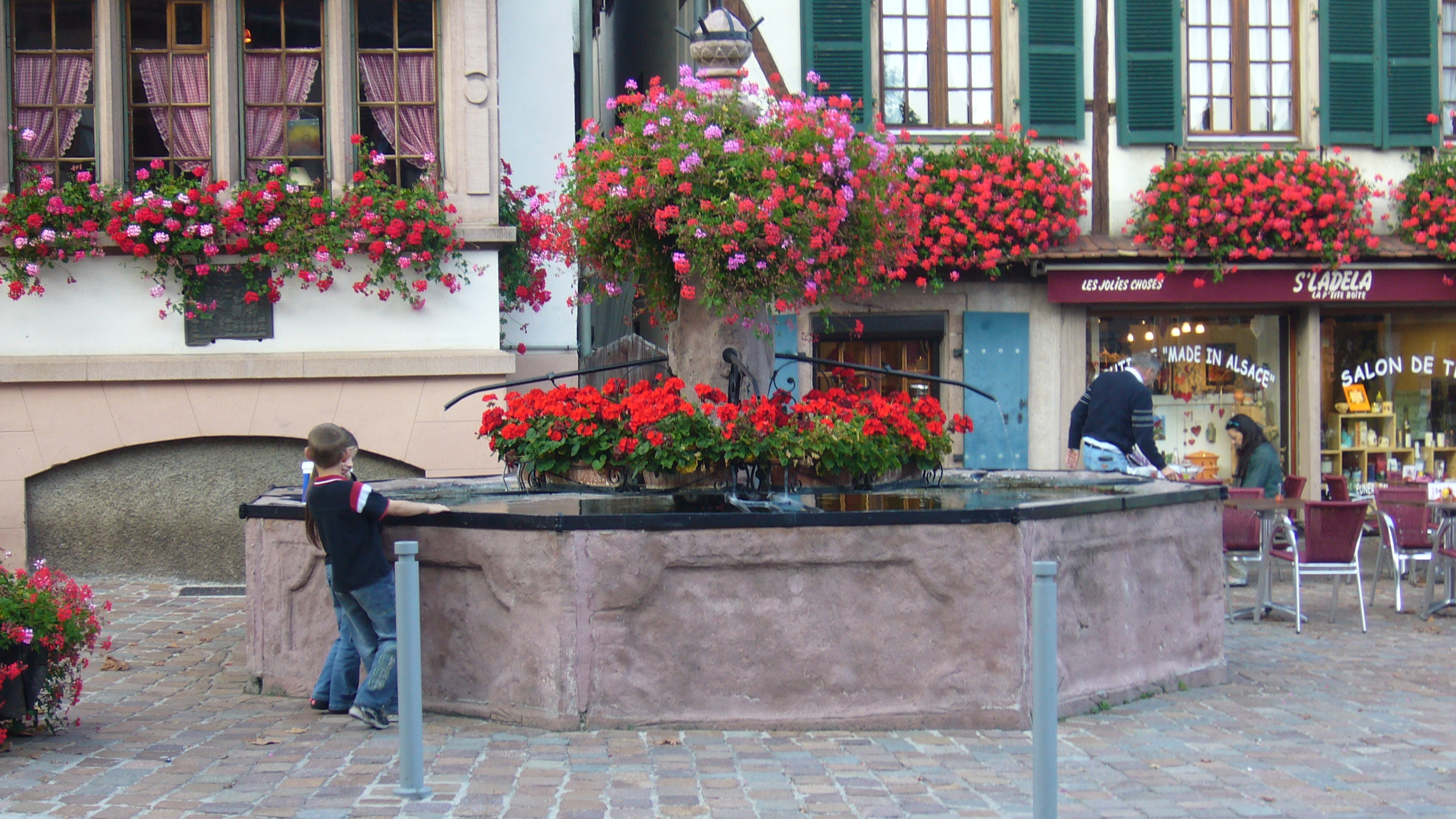 Ancienne fontaine, rue de la Liberté, à Kintzheim